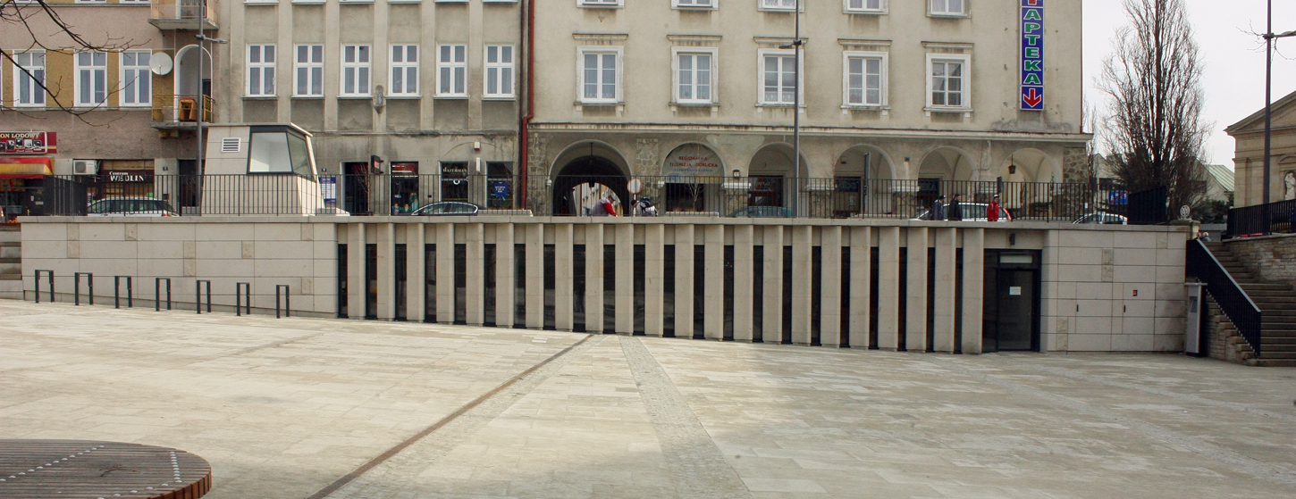 Pawilon Historii Miasta Gorlice